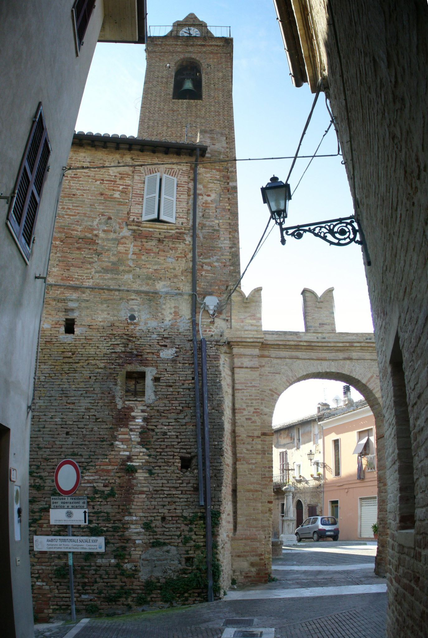 Piemontèis: Ël ciochè.